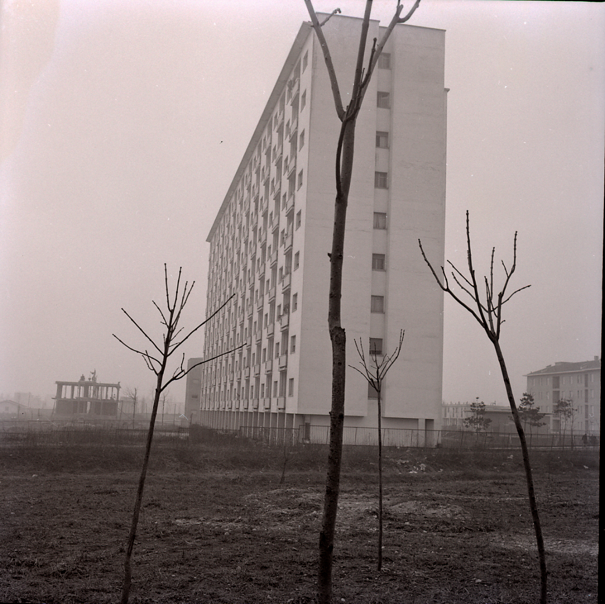 Serie fotografica : Milano, 1970 / Paolo Monti. - Buste: 12, Fototipi: 12 : Negativo b/n, gelatina bromuro d'argento/ pellicola ; 6x6. - ((Serie costituita da 12 negativi identificati con i nn.: 8492-8503. La suddetta serie è contenuta nella scatola identificata con la numerazione R8371-8564. Sul coperchio della scatola manoscritto: "Milano Periferia". Sulla busta 8492 manoscritto: "Q.T.8.". - QT8